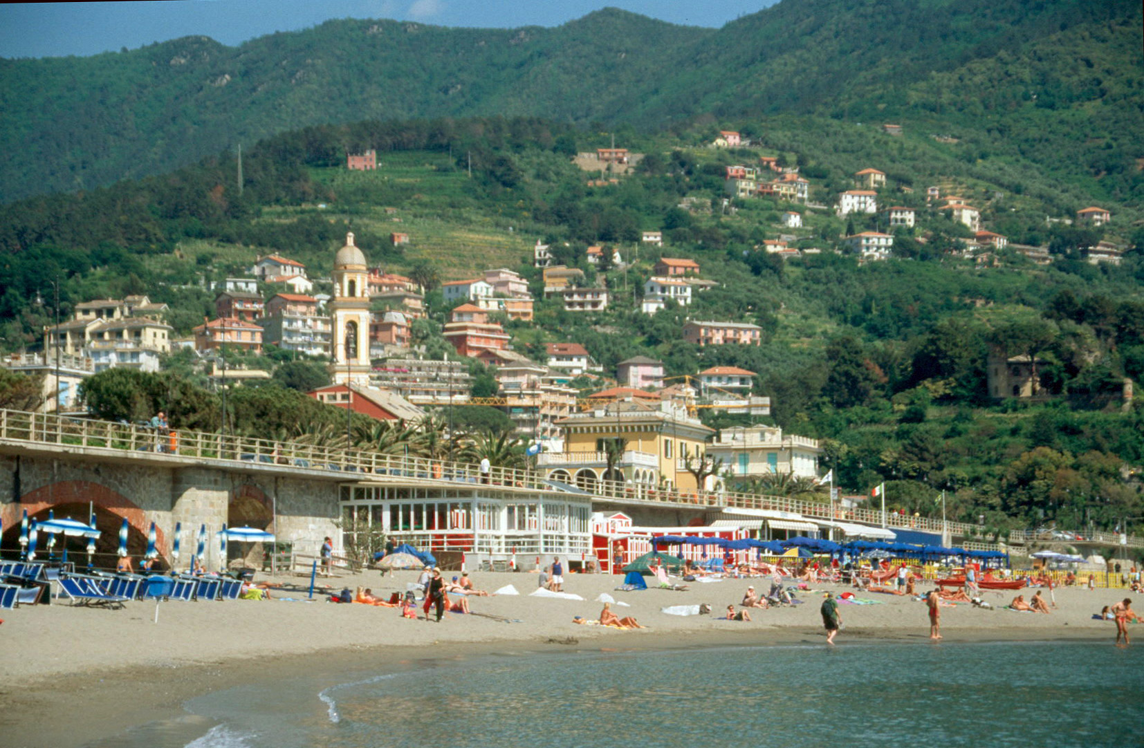 Moneglia 2004